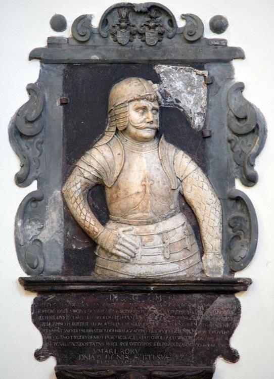 Przasnysz - nagrobek Adriana Szumskiego w kościele p.w. śś. Jakuba i Anny